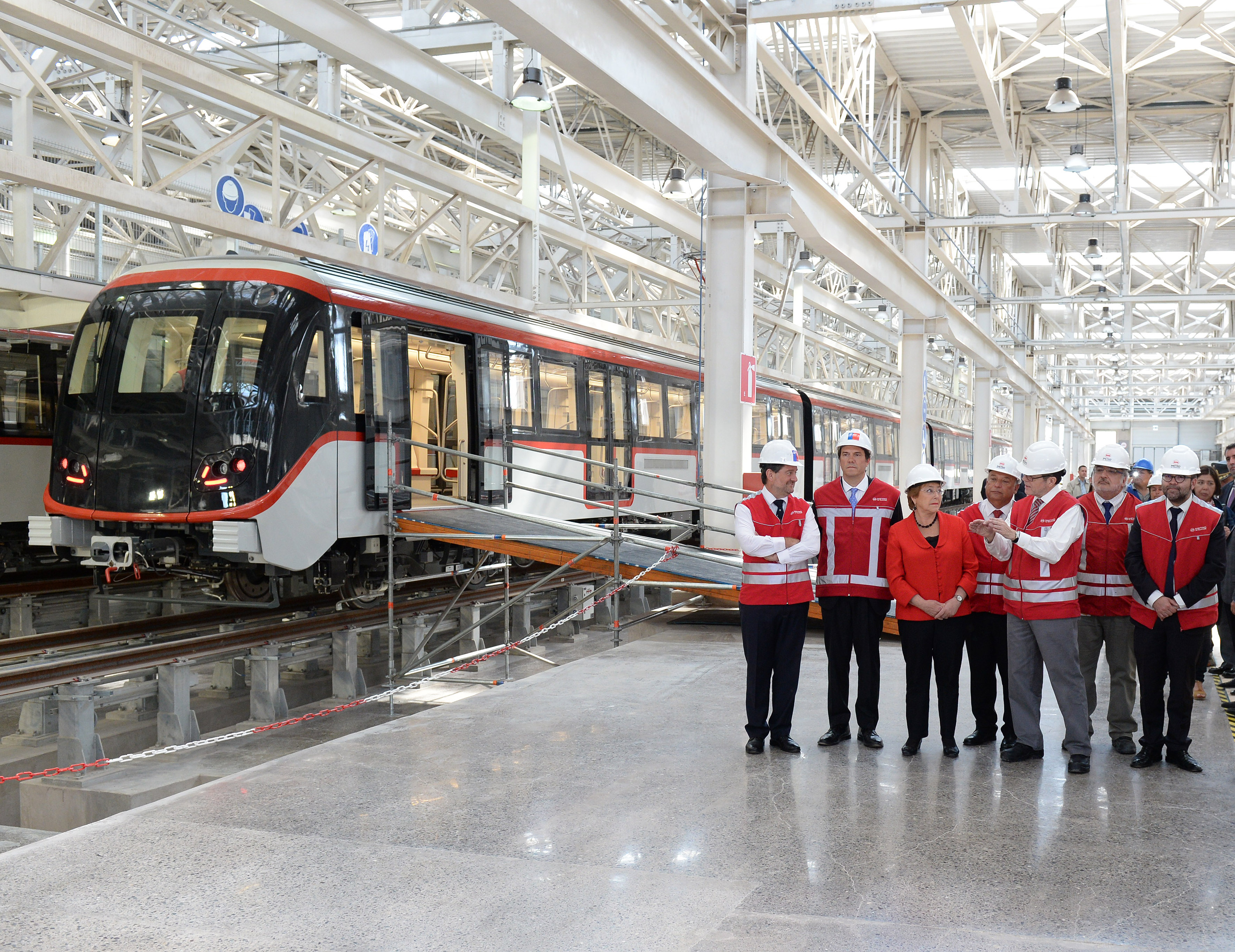 Gobierno de Chile